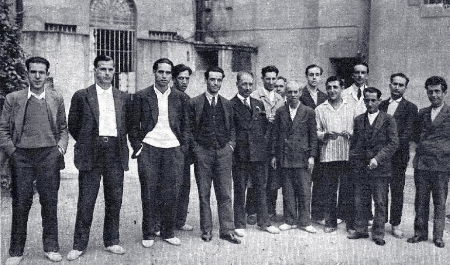 Los presos políticos en el patio de la Cárcel Modelo, en el artículo Asuntos varios de Barcelona, en el número 993 de Mundo Gráfico (12 de noviembre de 1930)